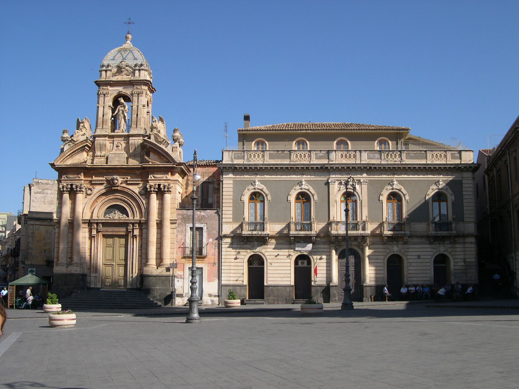 Biancavilla, chiesa del Rosario dell'architetto Carlo Sada. Foto di Archenzo